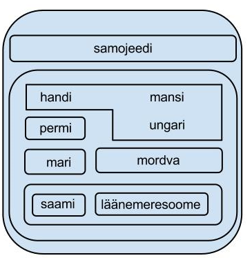 Uurali keelte areaalsete ja tüpoloogiliste tsoonide selgitamiseks kasutatud niinimetatud meiootilise amööbi mudel, esitatud Daniel Abondolo järgi. (Ingliskeelne mudel on esitatud allikas: Daniel Abondolo. Introduction. In: Daniel Abondolo (Ed.). The Uralic Languages. London: Routledge 1998, p 3.)